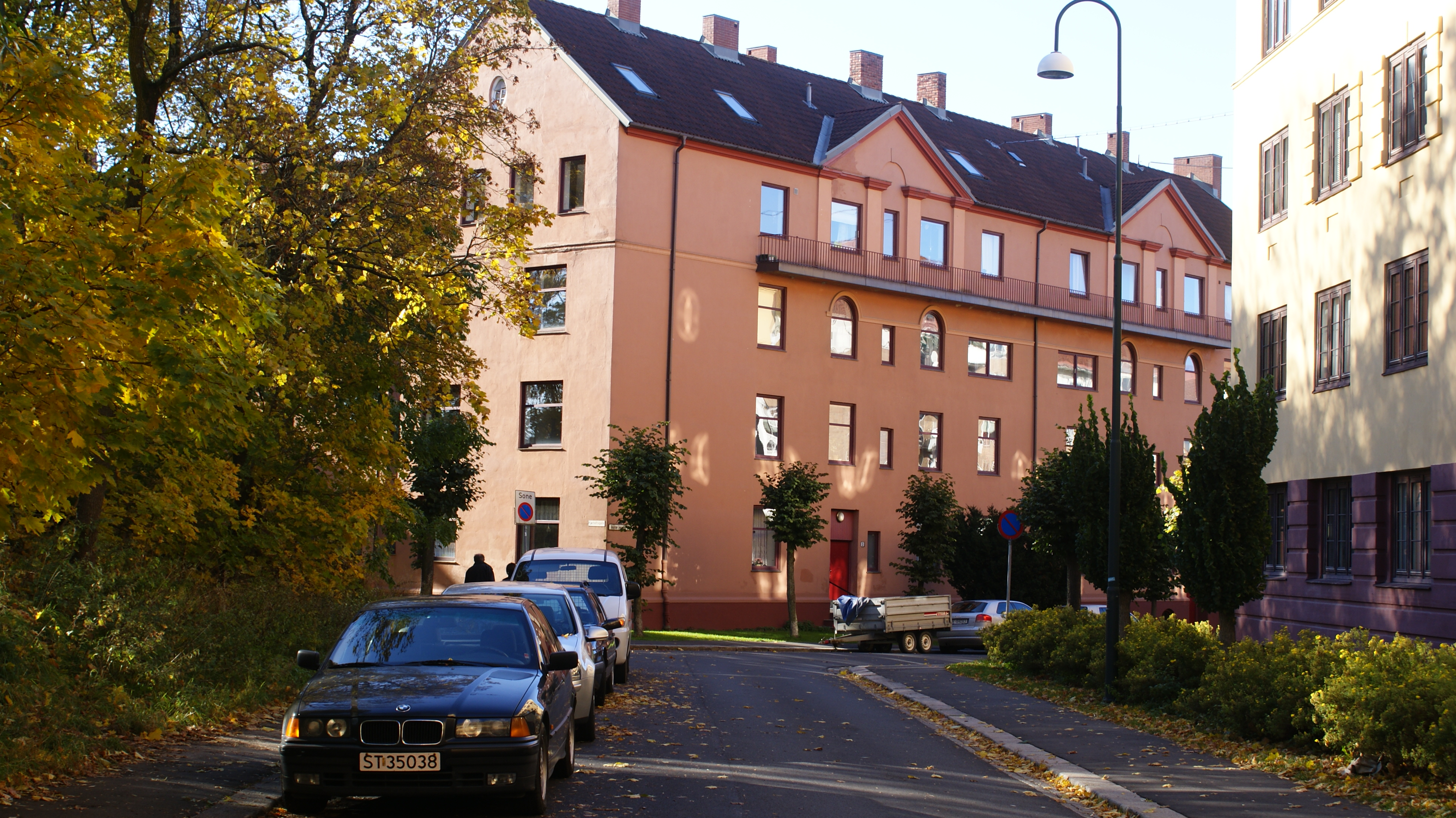 Gustav Jensens gate, Sagene, Oslo.